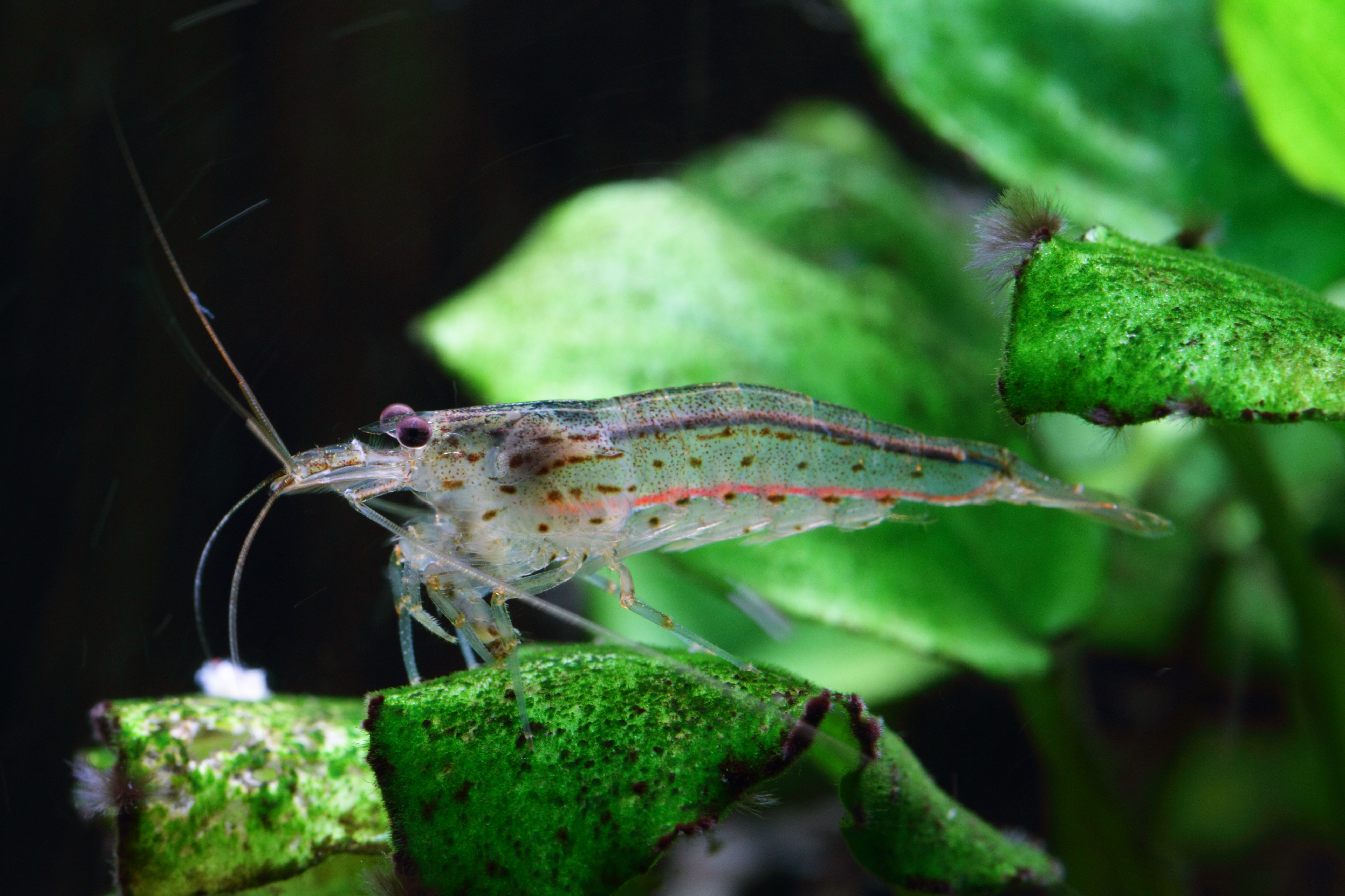 Amano-Garnele Caridina multidentata im Haus des Meeres